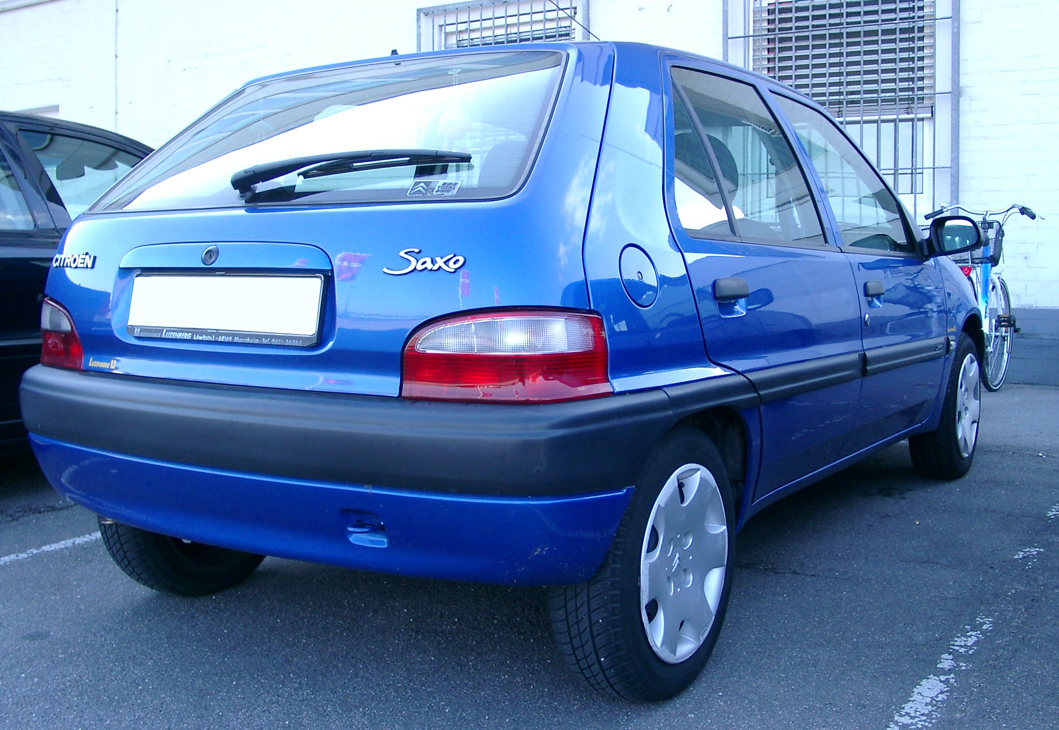 Citroën Saxo